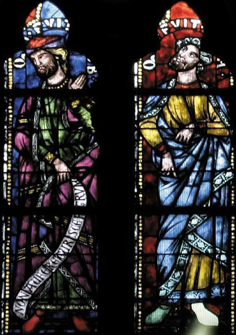 Première fenêtre de la quatrième travée du triforium méridional de la cathédrale de Strasbourg représentant Jacob et Juda.